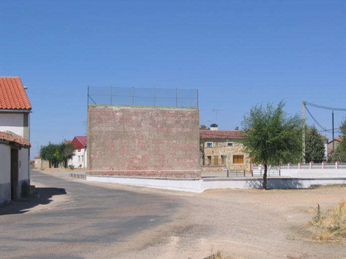 Fronton cara sur